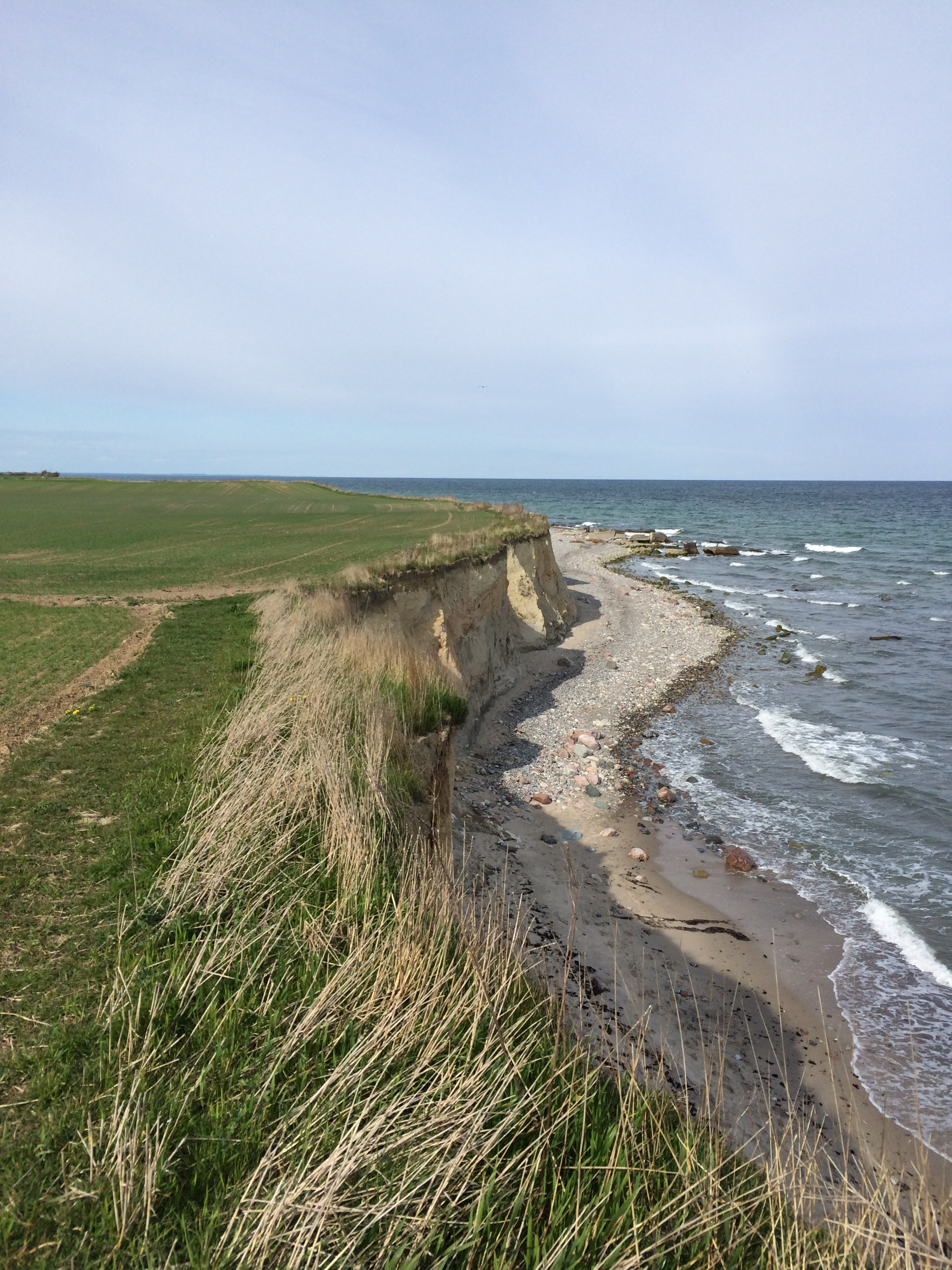 Cliffs on Falster, Denmark